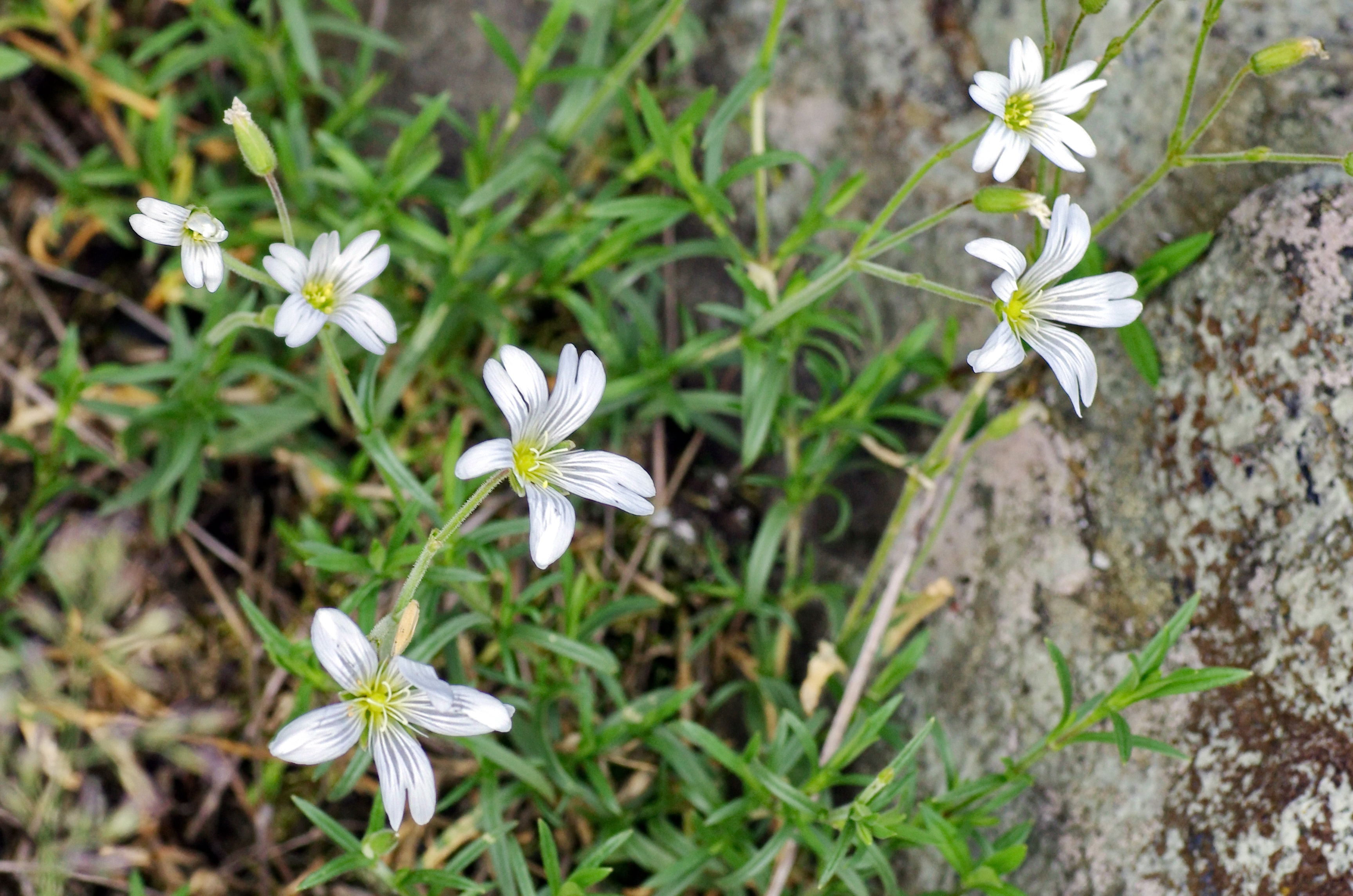 Národní přírodní památka Křížky, Rožec kuřičkolistý (Cerastium alsinifolium), Slavkovský les, okres Cheb